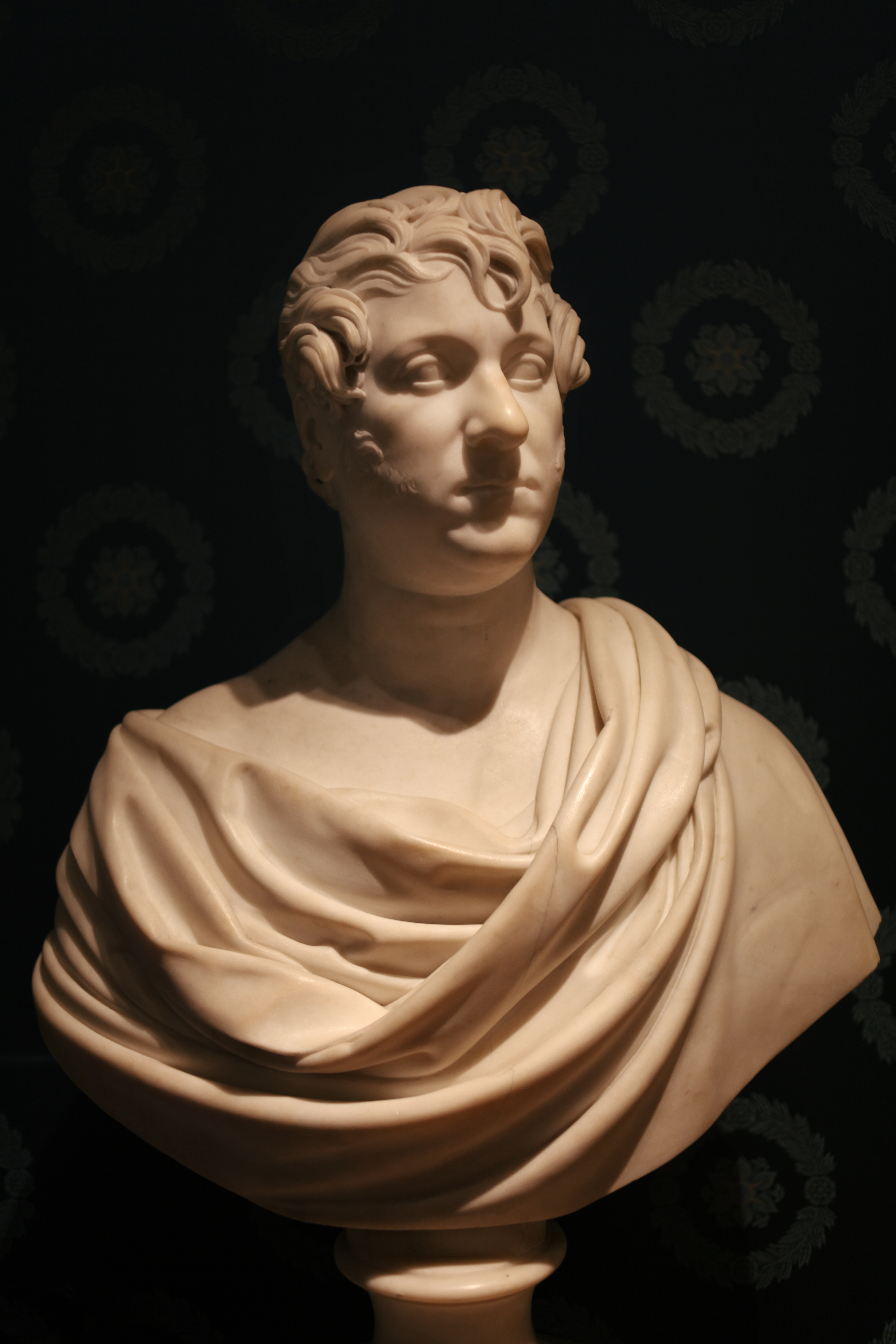 Lorenzo Bartolini (1777-1850) Ritratto del coreografo Salvatore Viganò, al Museo del Teatro alla Scala, Milano